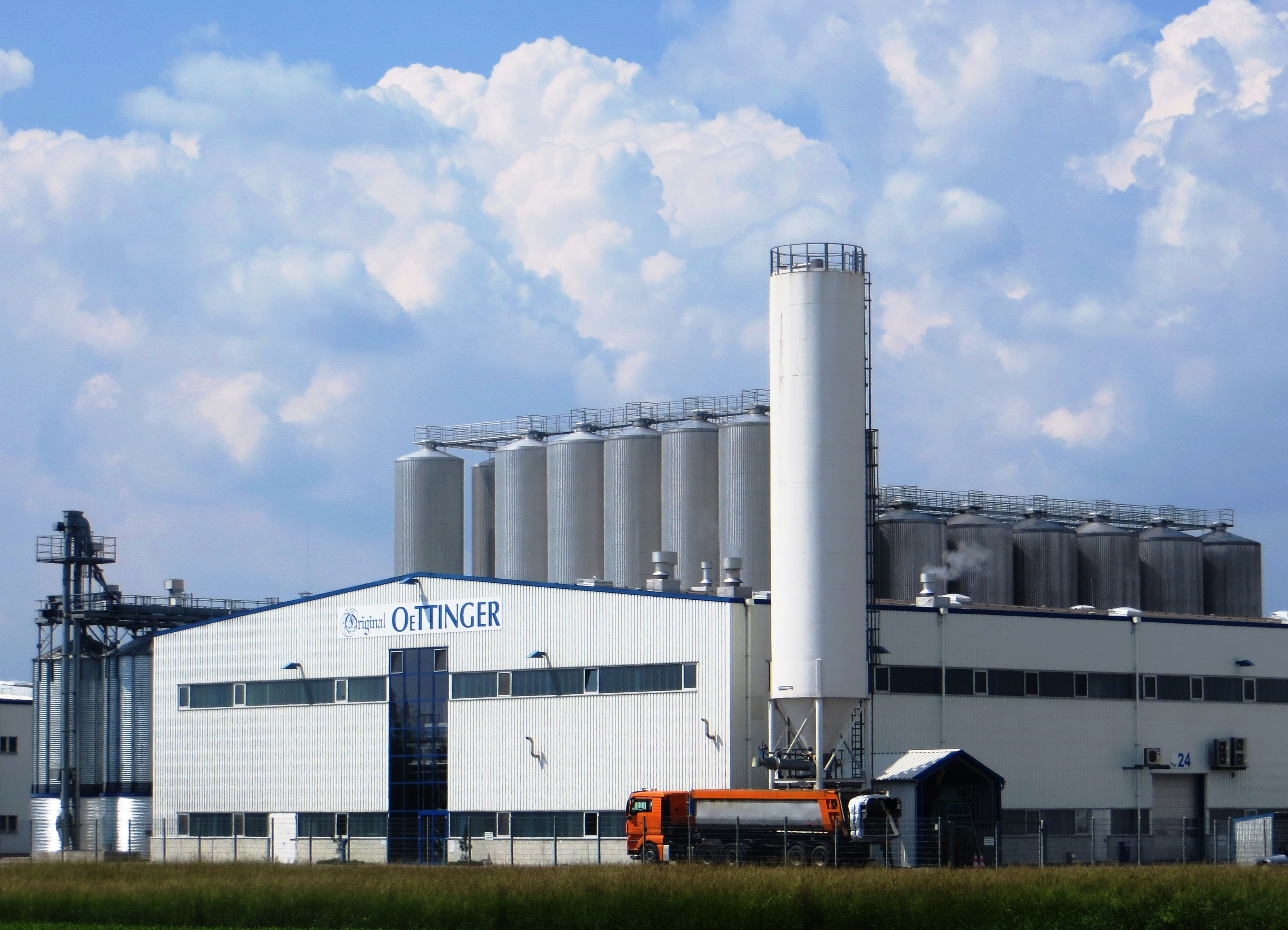 Oettinger (bier)